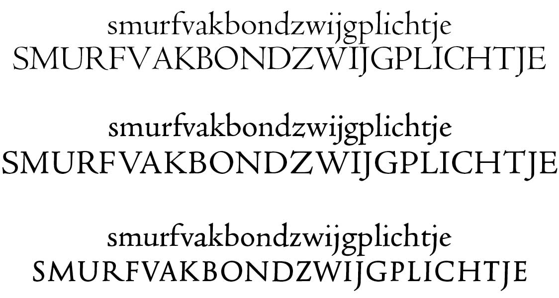 compare 3 fonts: Centaur, Adobe Jenson and Atalanta